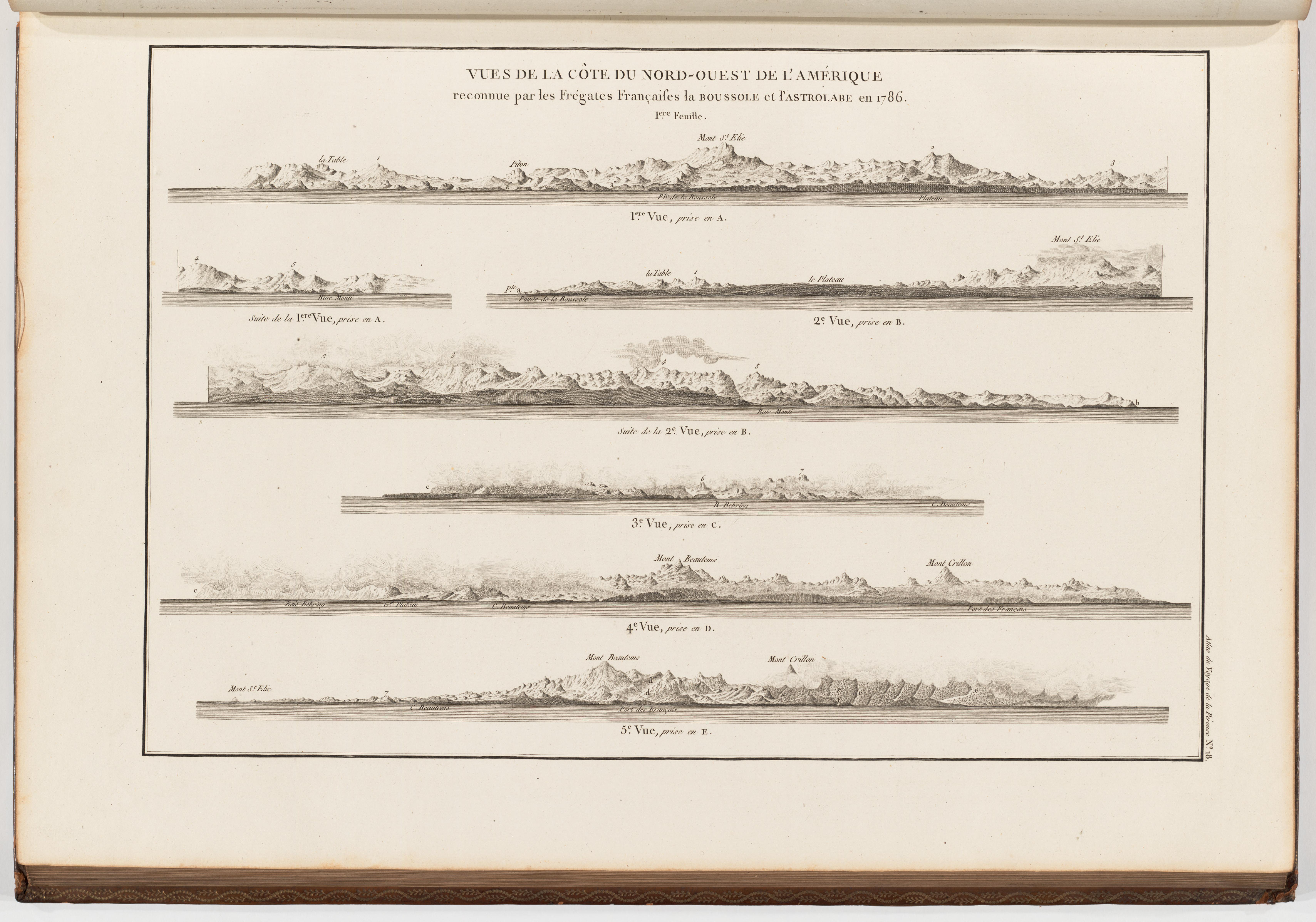 Voyage de La Pérouse autour du monde /publié conformément au décret du 22 avril 1791, et rédigé par L.A. Milet-Mureau.